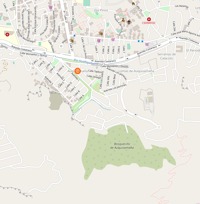 Mapa de parte de la zona Sur de La Paz, zona en la que s eubica el bosquecillo de Auquisamaña.